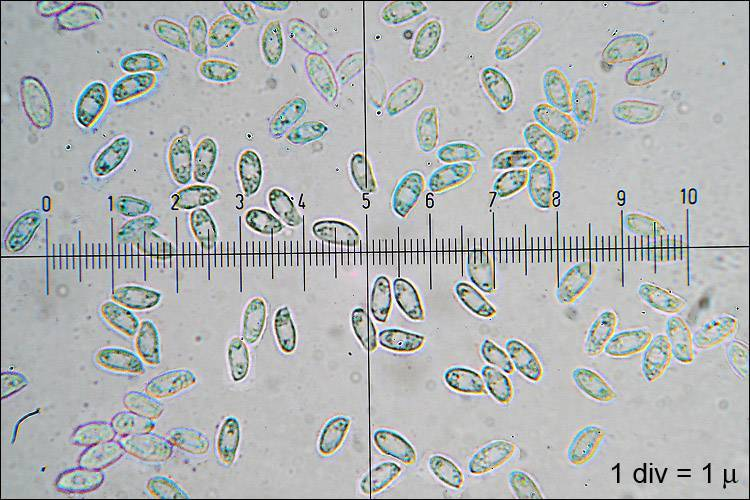 Lentinus tigrinus (Bull.) Fr.